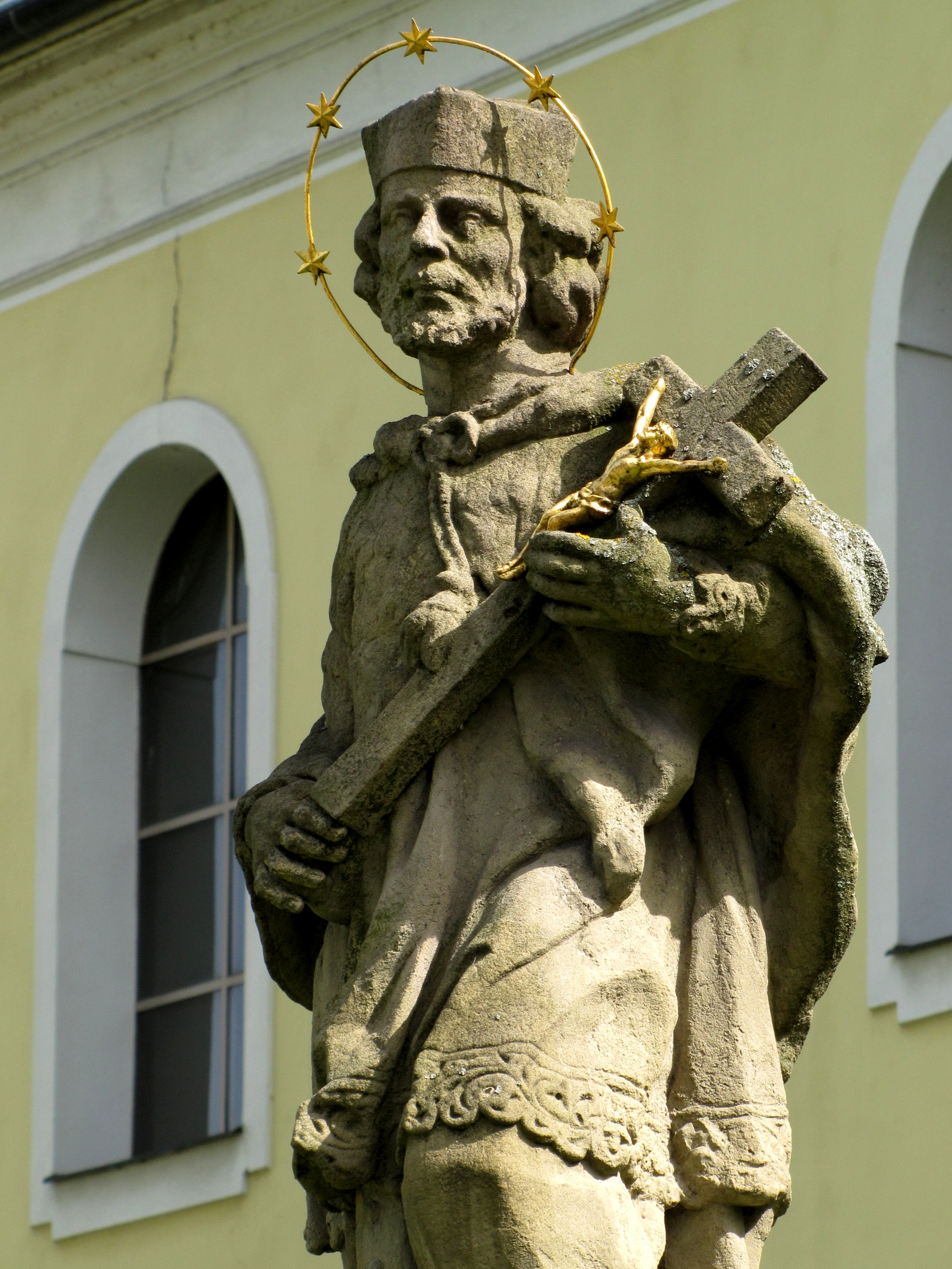 Barokní socha sv. Jana Nepomuckého z roku 1730 u kostela sv. Vavřince ve Vizovicích